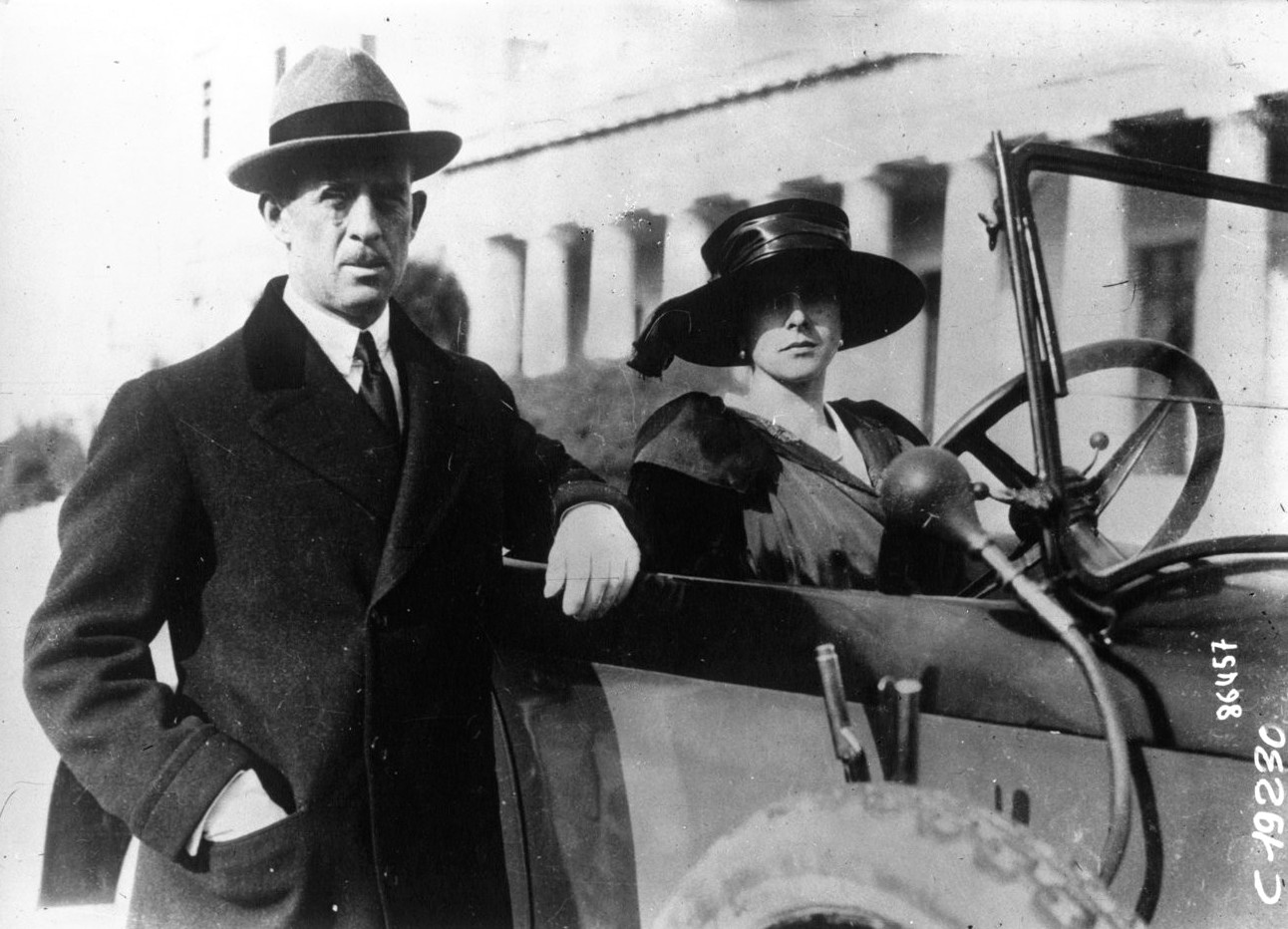 Le prince André de Grèce et la princesse Alice dans leur Mercédès dans leur palais.